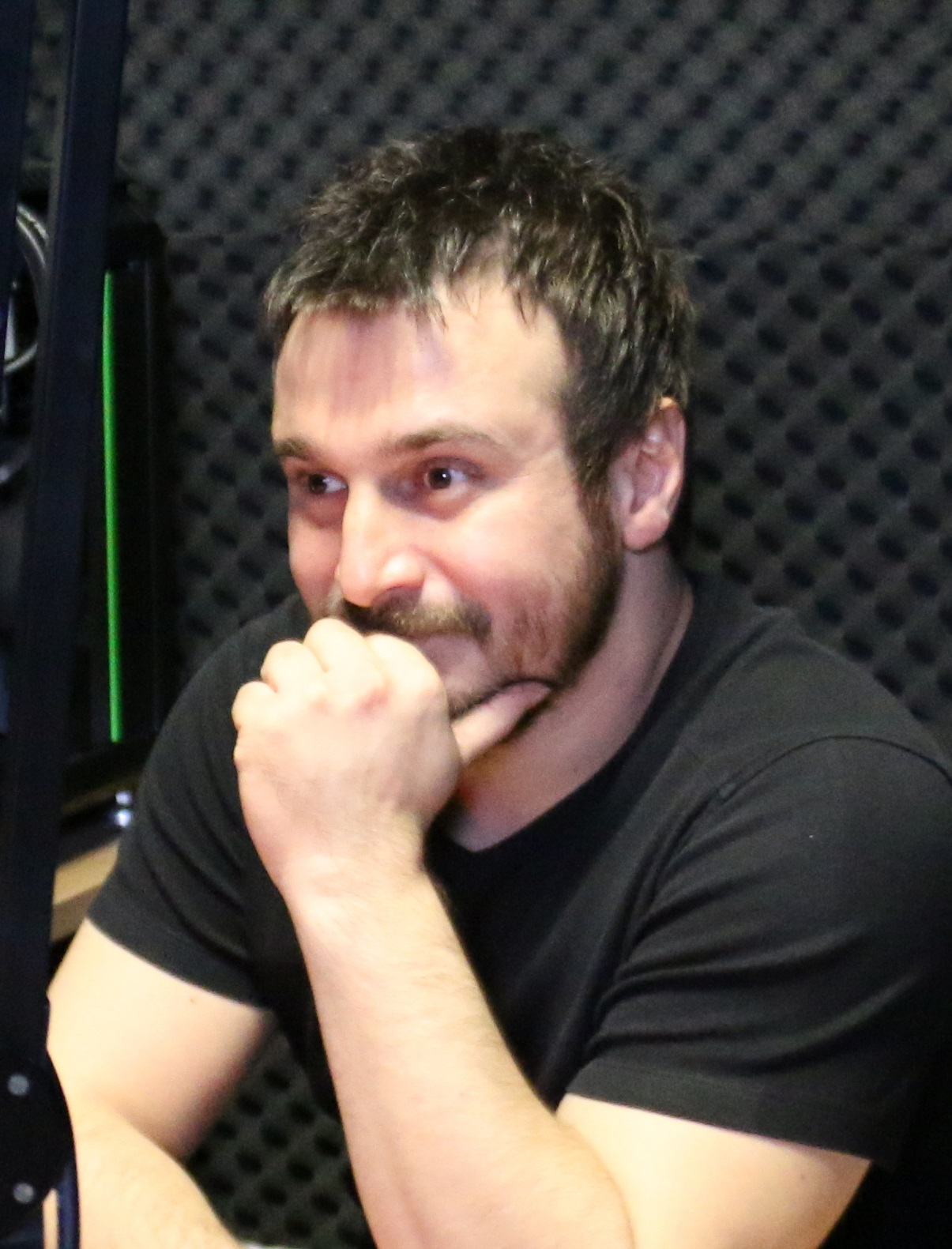 Serdar Gökalp